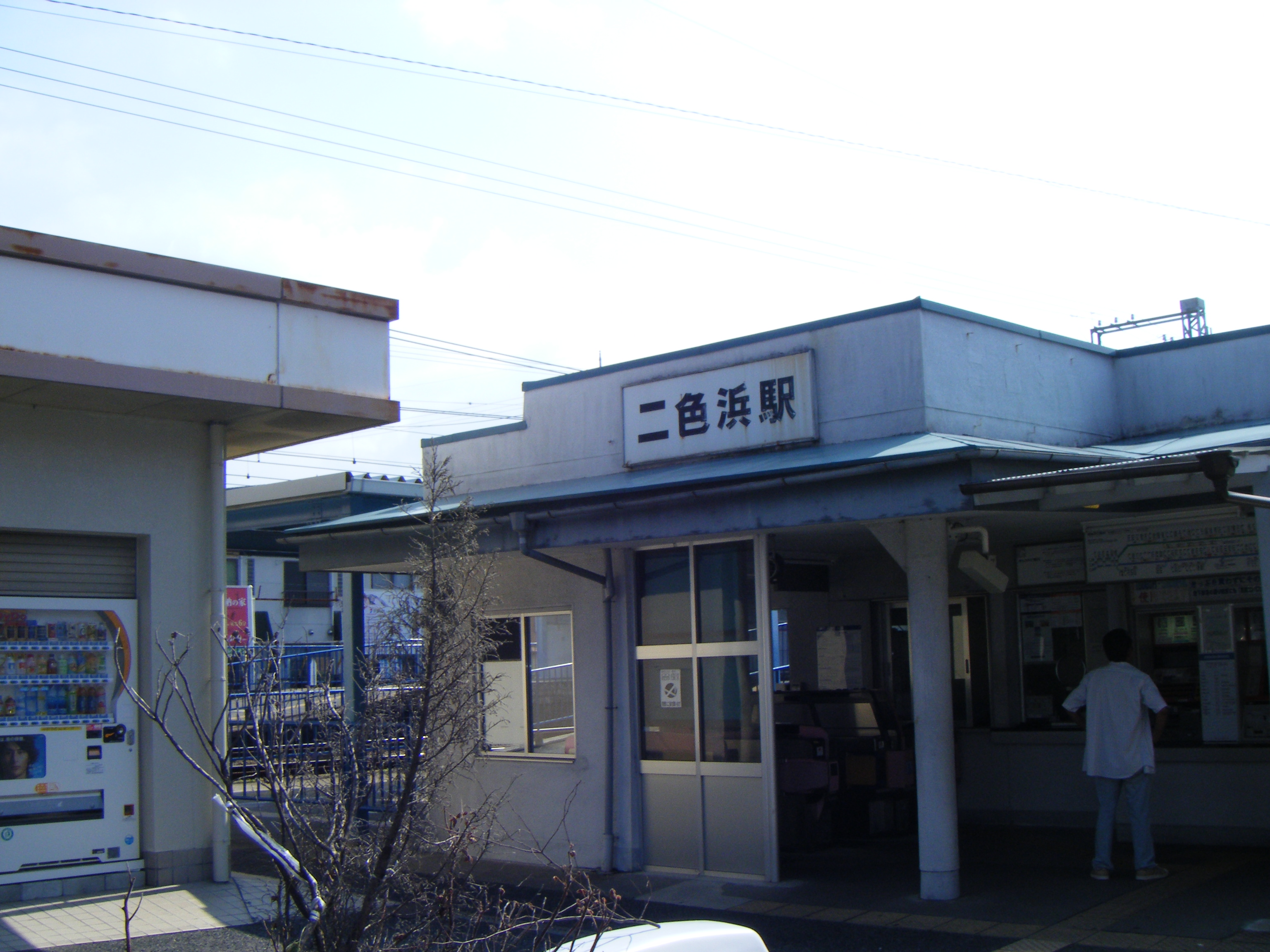 南海本線 二色浜駅駅舎